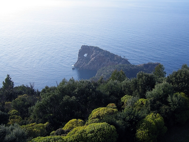 Punta de Sa Foradada - Mallorca - Spain